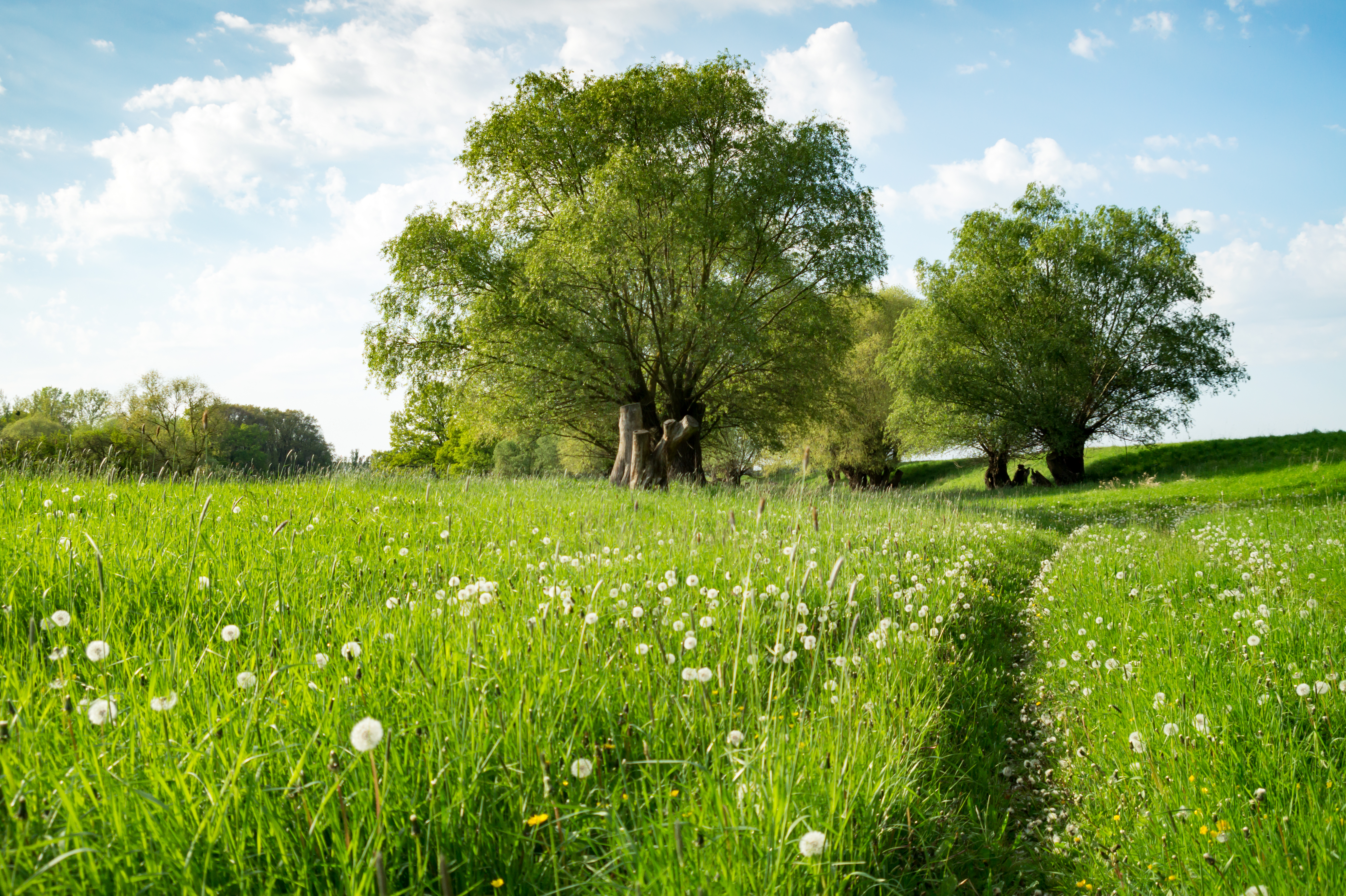 Saaleaue bei Barby im FFH-Gebiet DE-4037-303 „Saaleaue bei Groß Rosenburg“; der Bereich liegt außerdem im Landschaftsschutzgebiet „Mittlere Elbe“, im EU-Vogelschutzgebiet DE-4139-401 „Mittlere Elbe einschließlich Steckby-Lödderitzer Forst“ und im Biosphärenreservat „Flusslandschaft Elbe“.